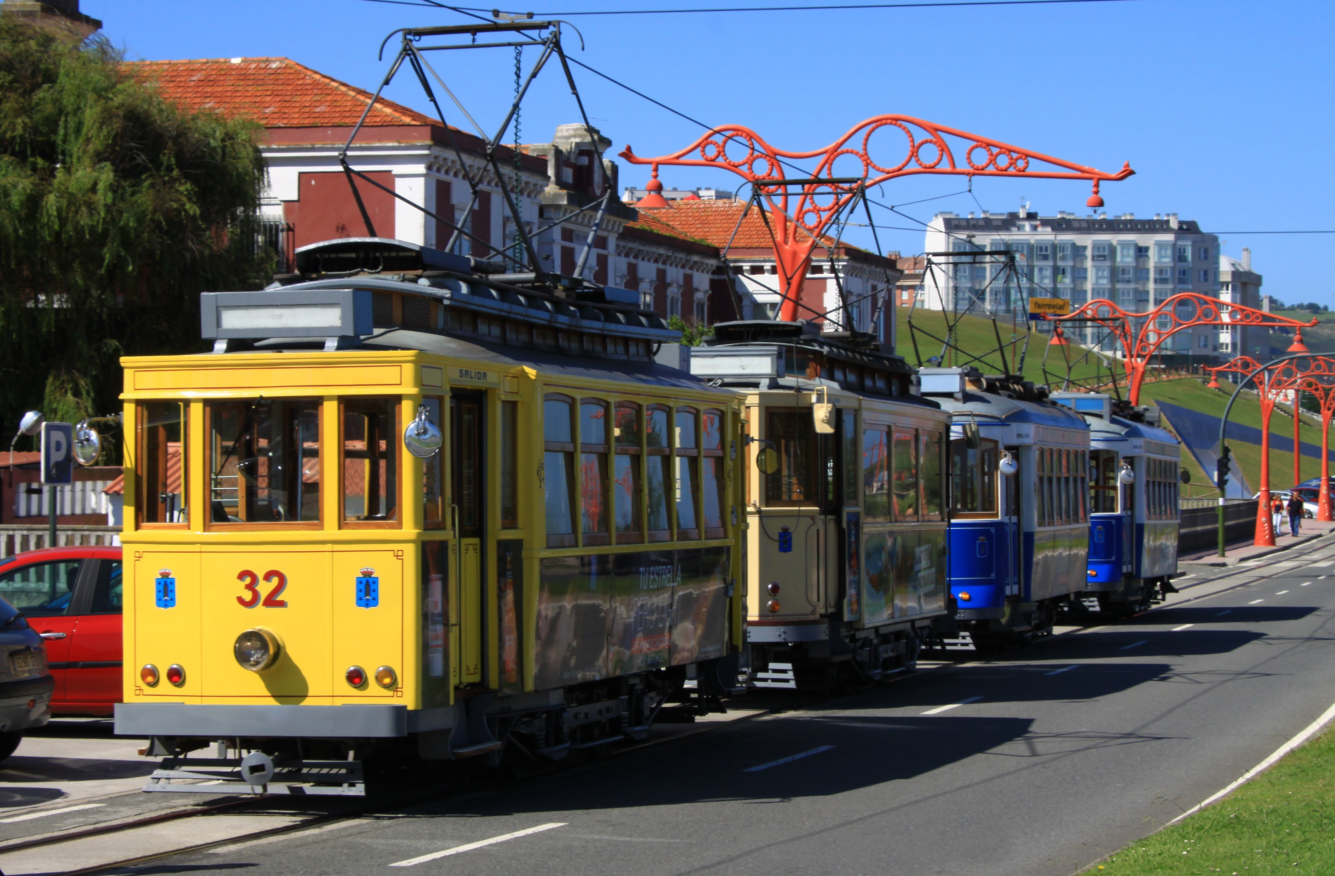 "ATASCO" de Tranvías na Coruña 30 Ago 09